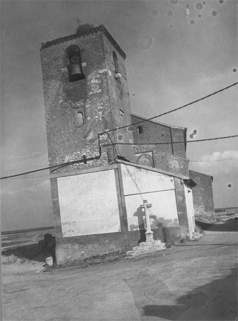 Iglesia parroquial de San Pedro Apóstol - Llano de Olmedo (Valladolid) - Álbum 200 x 140 - Fotografía. Papel 75 x 100 B/N